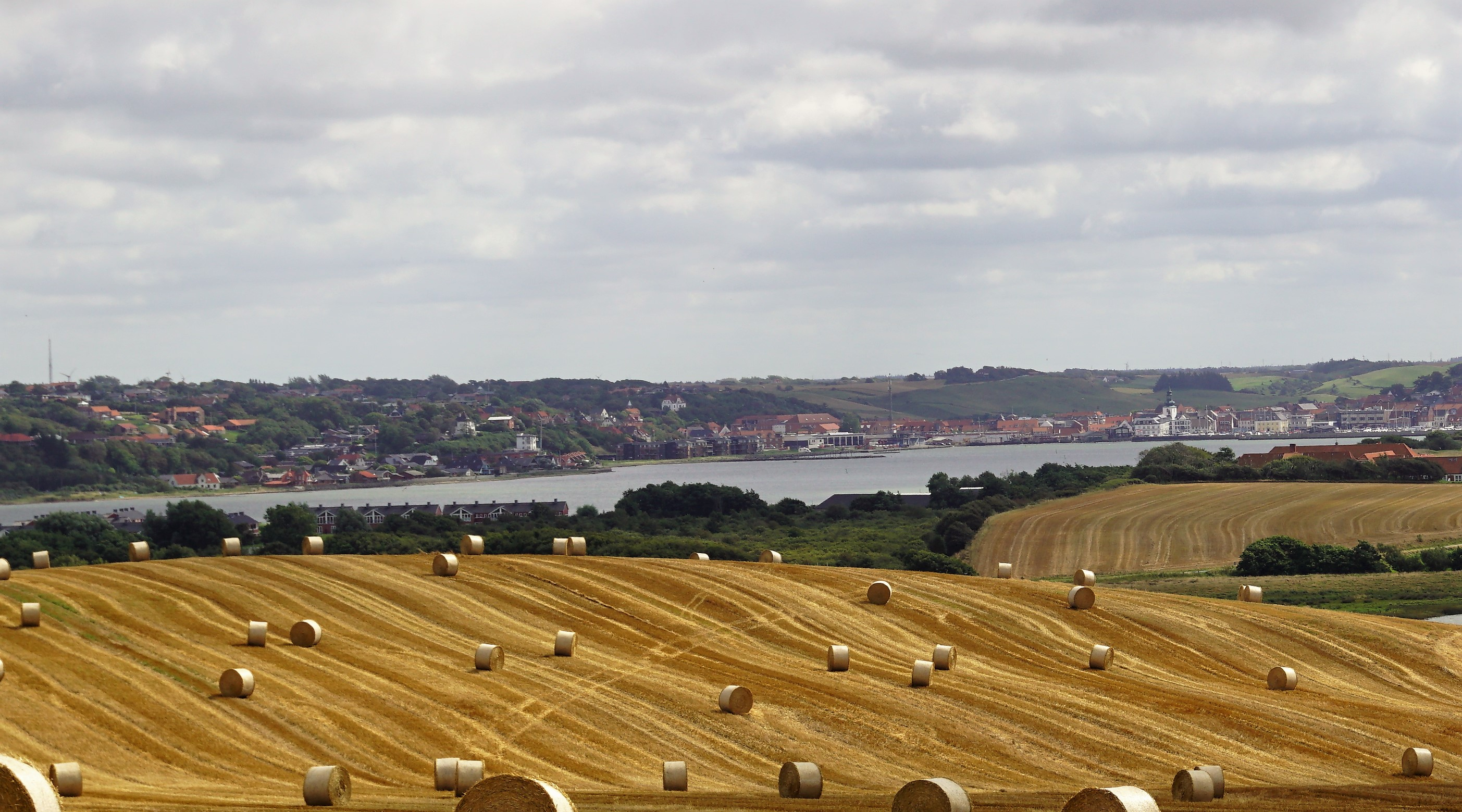 Lem Vig set mod sydøst